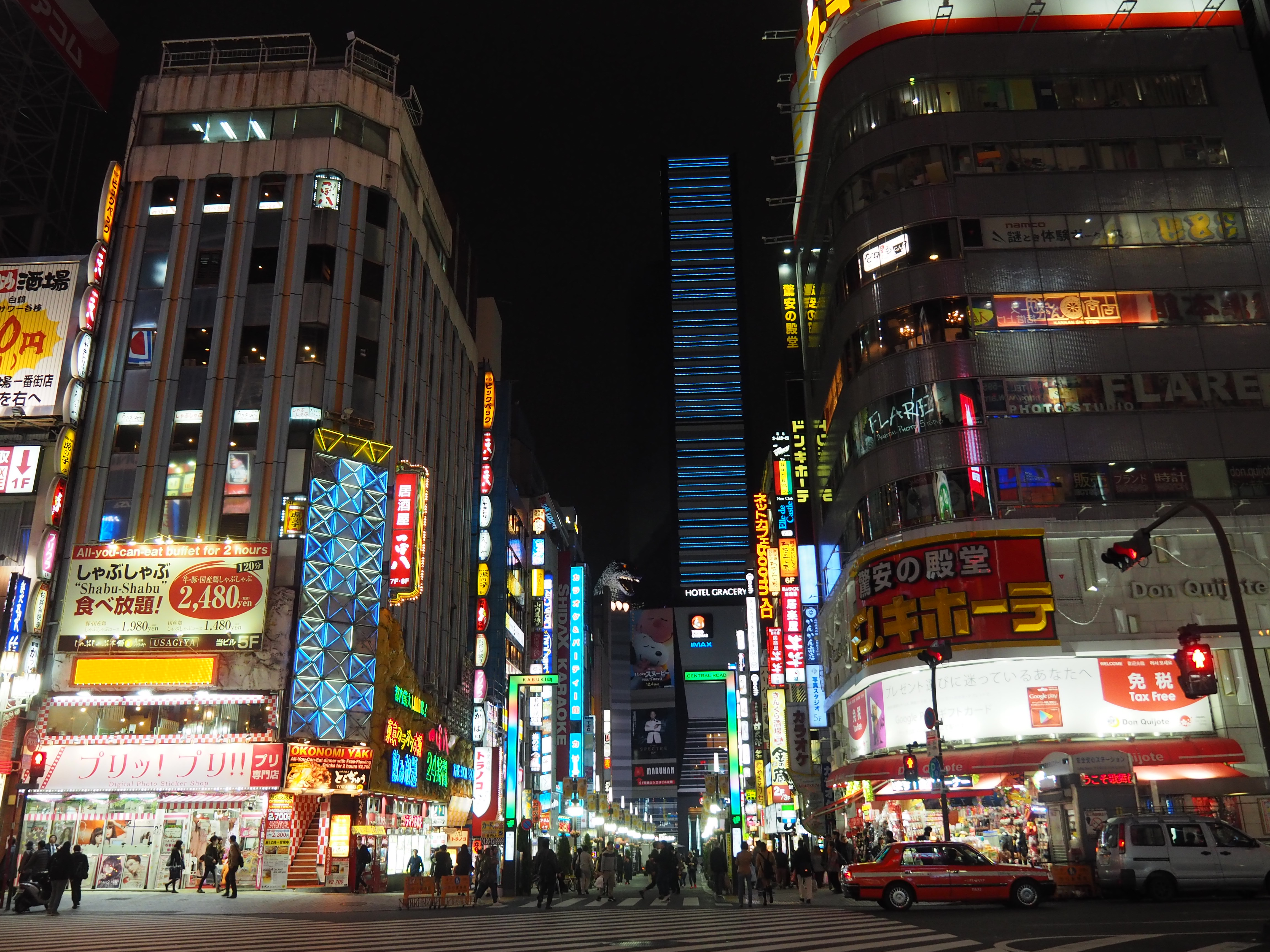 Shinjuku